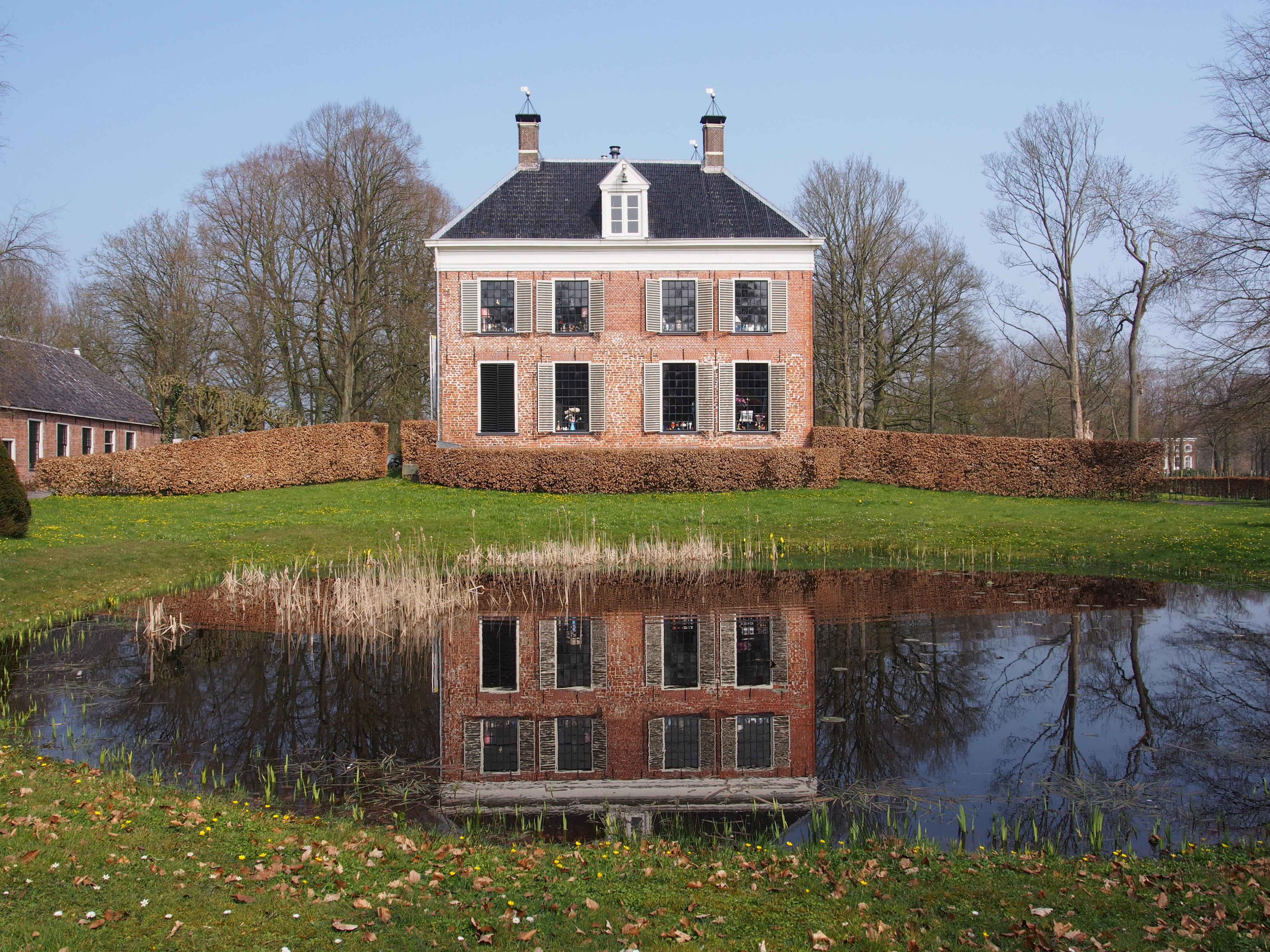 Ennema borg Midwolda